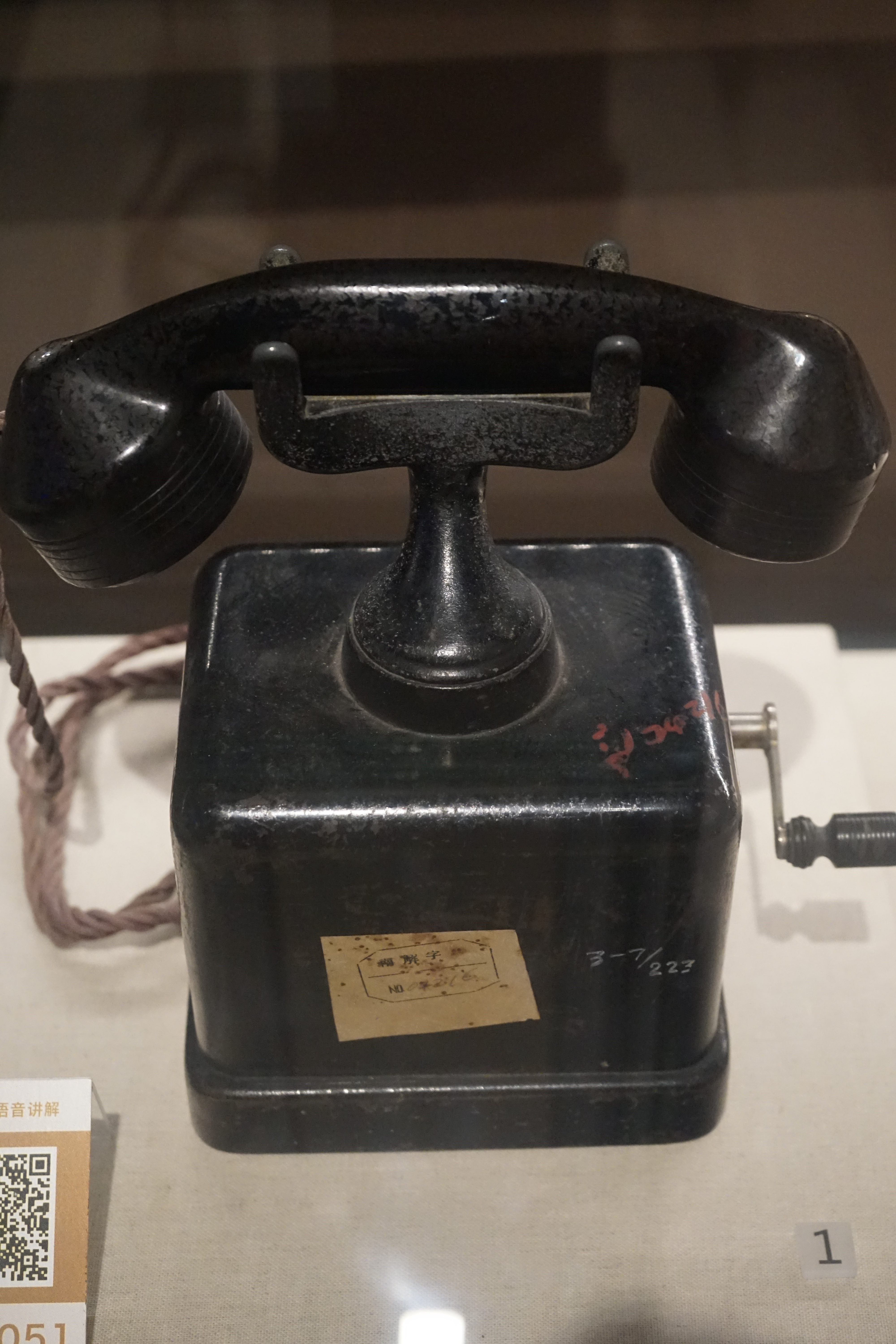 中文（中国大陆）: 淮海战役中，粟裕使用的电话机。一级文物。